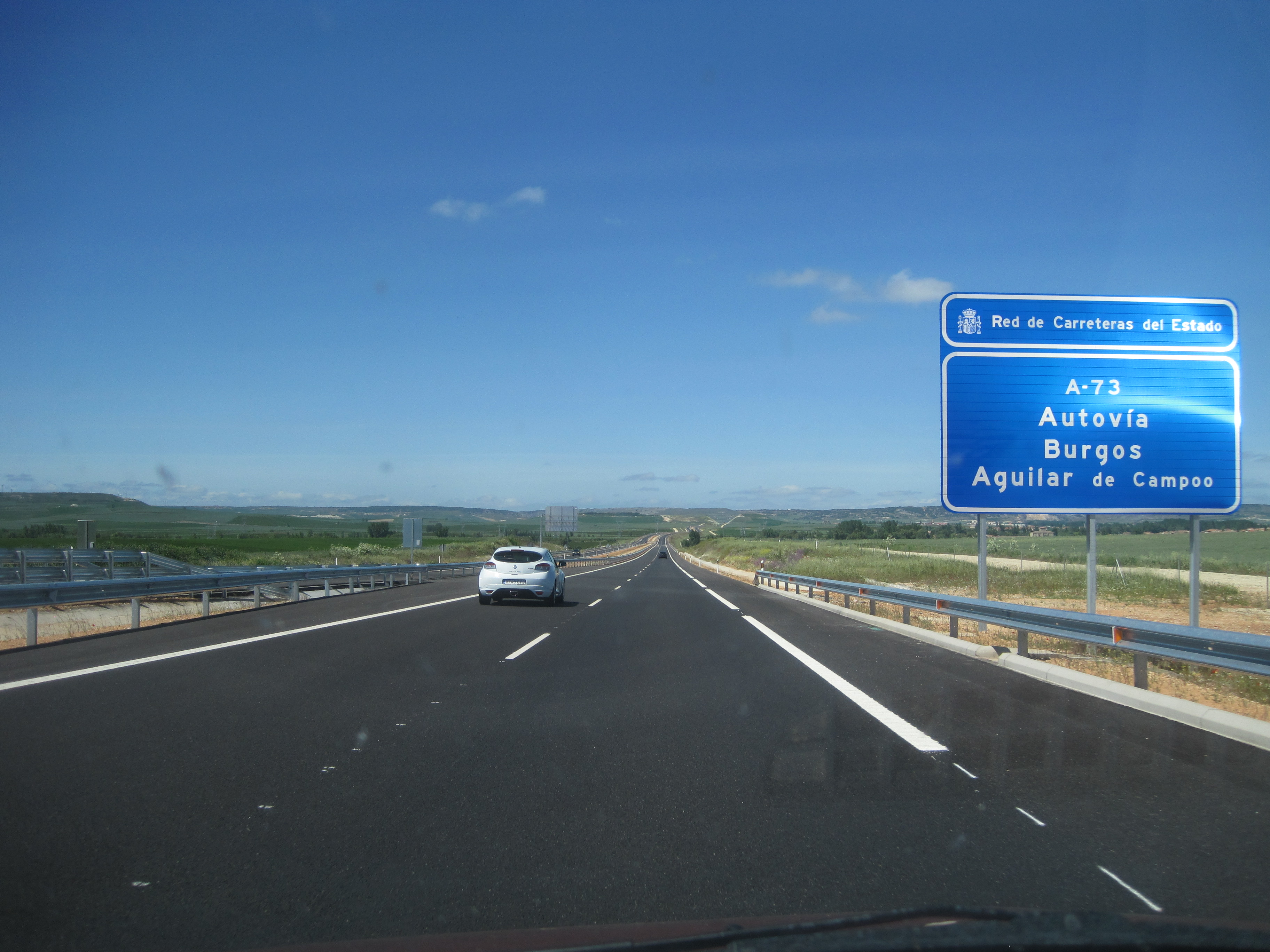 Foto de la A-73 autovía Burgos - Aguilar de Campoo al poco de entrar desde Villatoro.